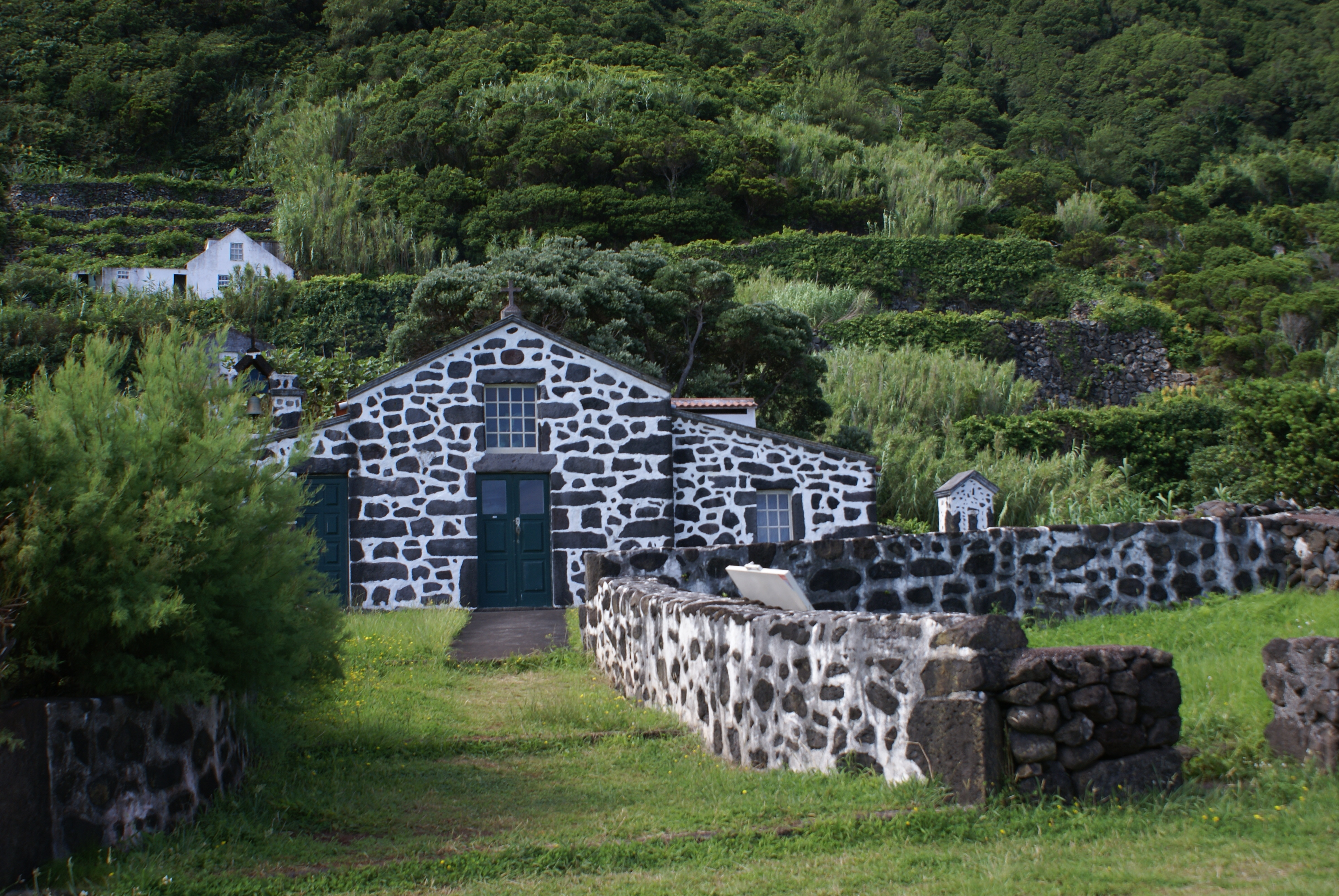 Fajã da Penedia, Ermida de Santa filomena, Norte Pqueno, Calheta, ilha de São Jorge, Açores